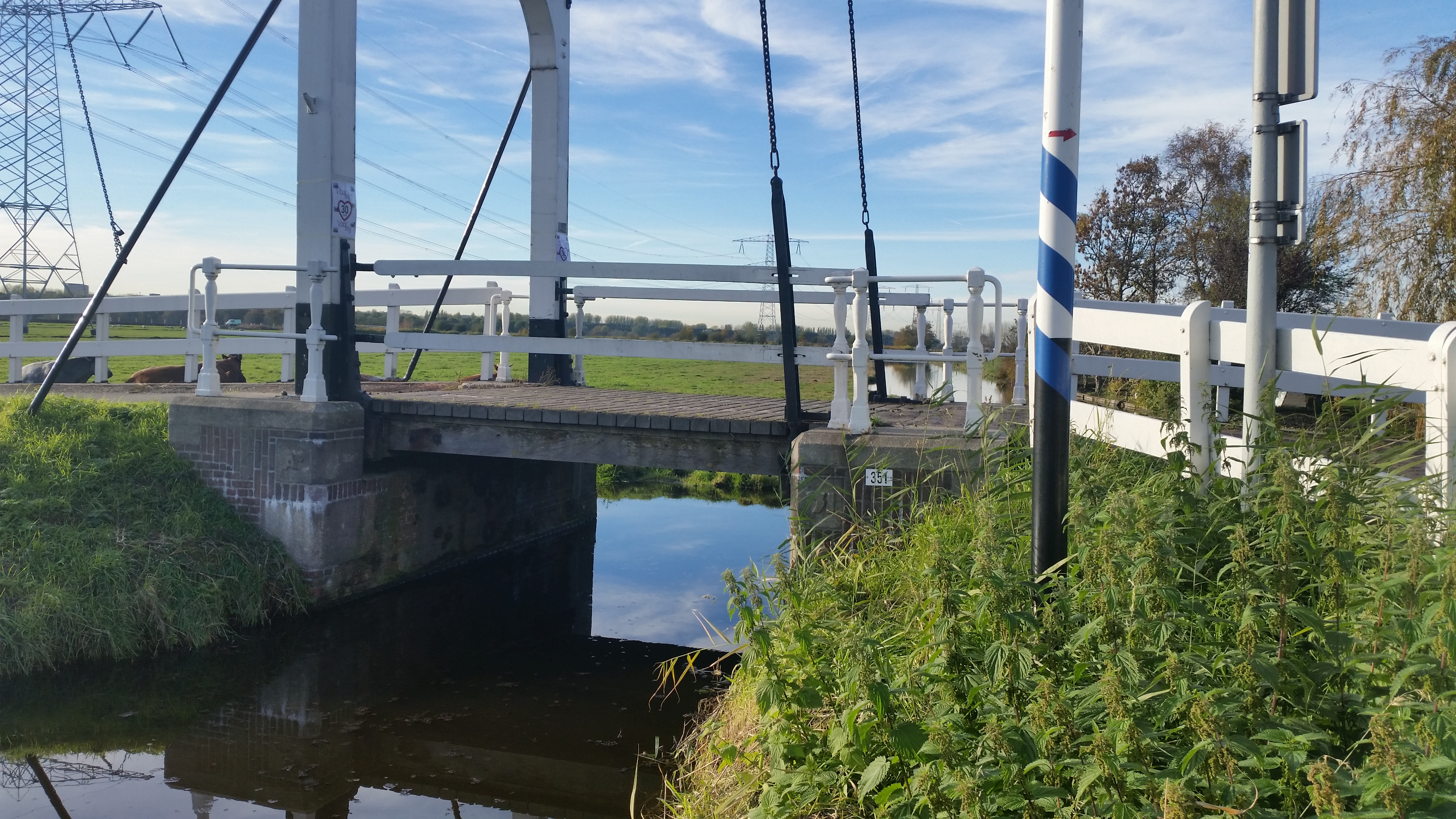 Brug 351, Postje van Gerrit Vreeling, zijaanzicht met nummerplaatje rechts